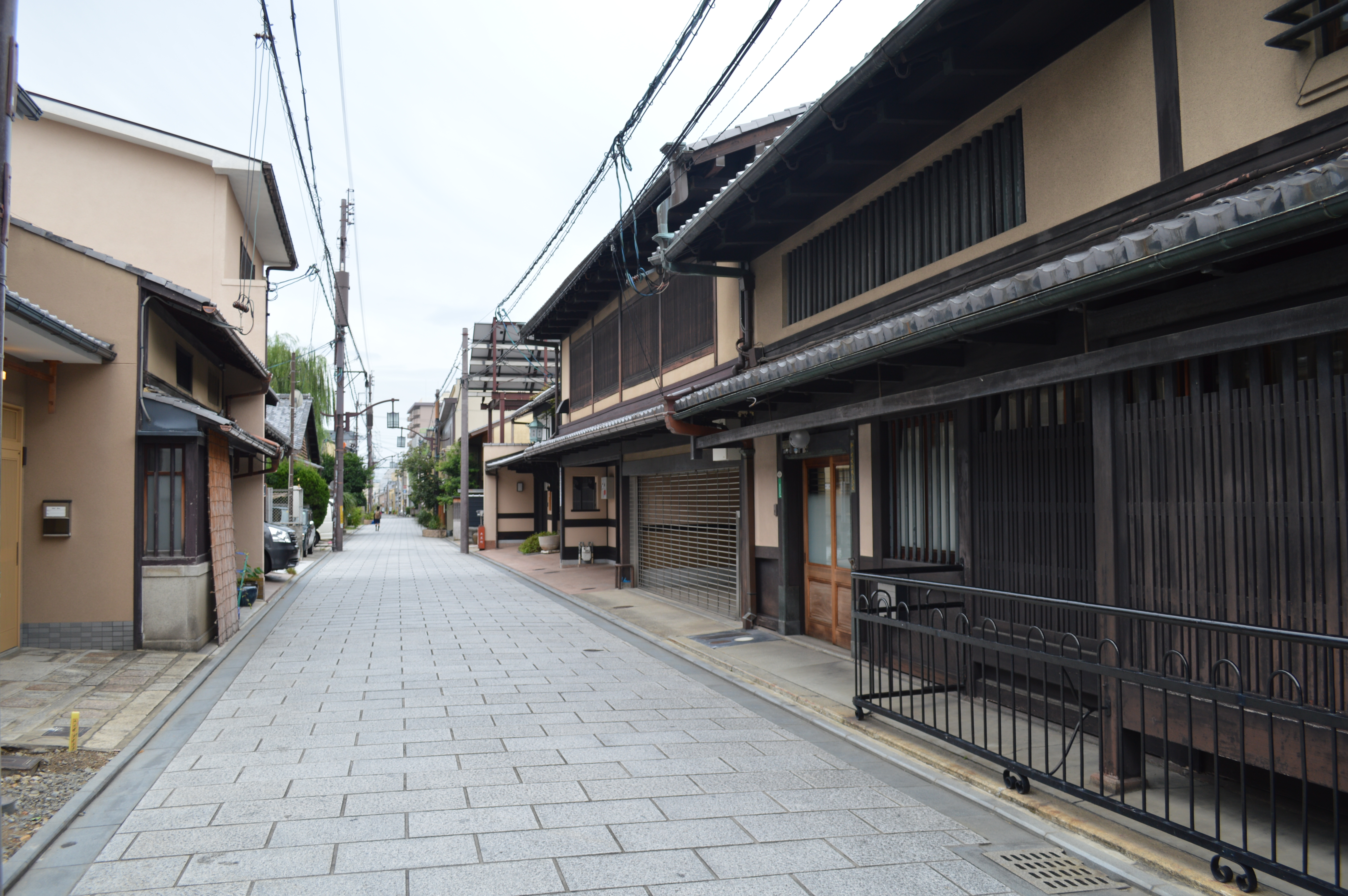 京都市上京区にある西陣地区、中心地の大黒町